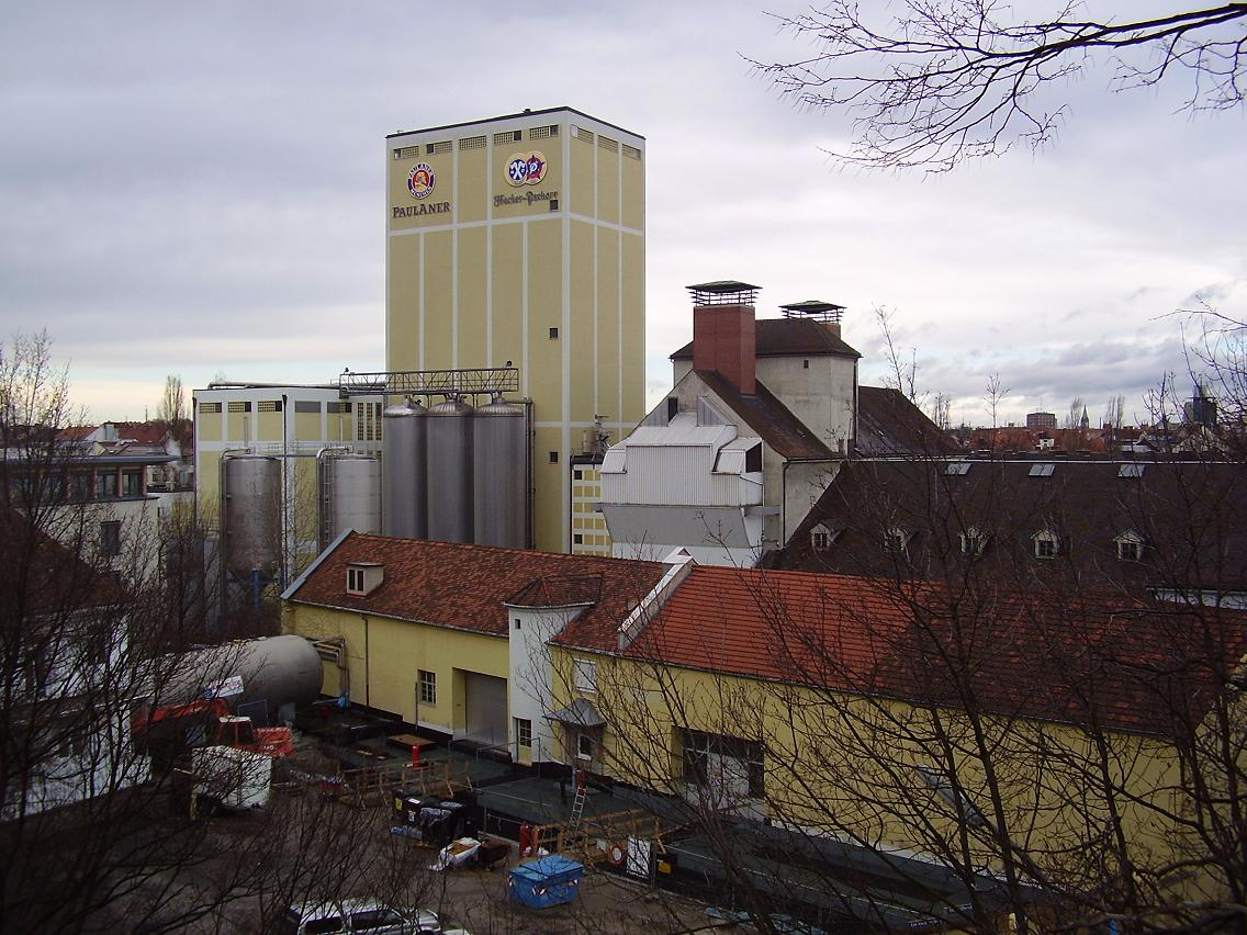 Paulaner (Brauerei) brewery in Munich (Germany)